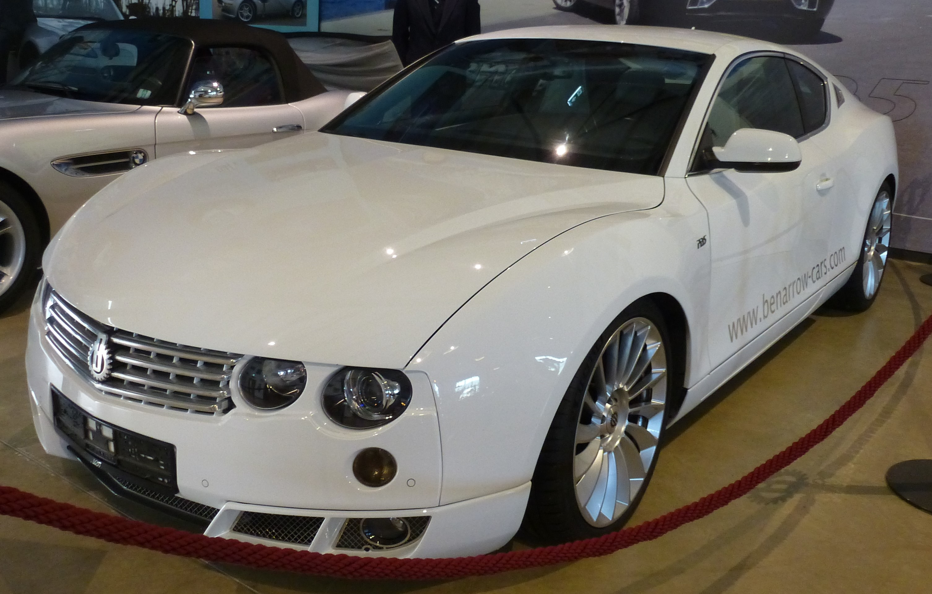 Benarrow PB 5